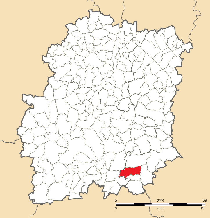 Carte de position de Gironville-sur-Essonne en Essonne (91)